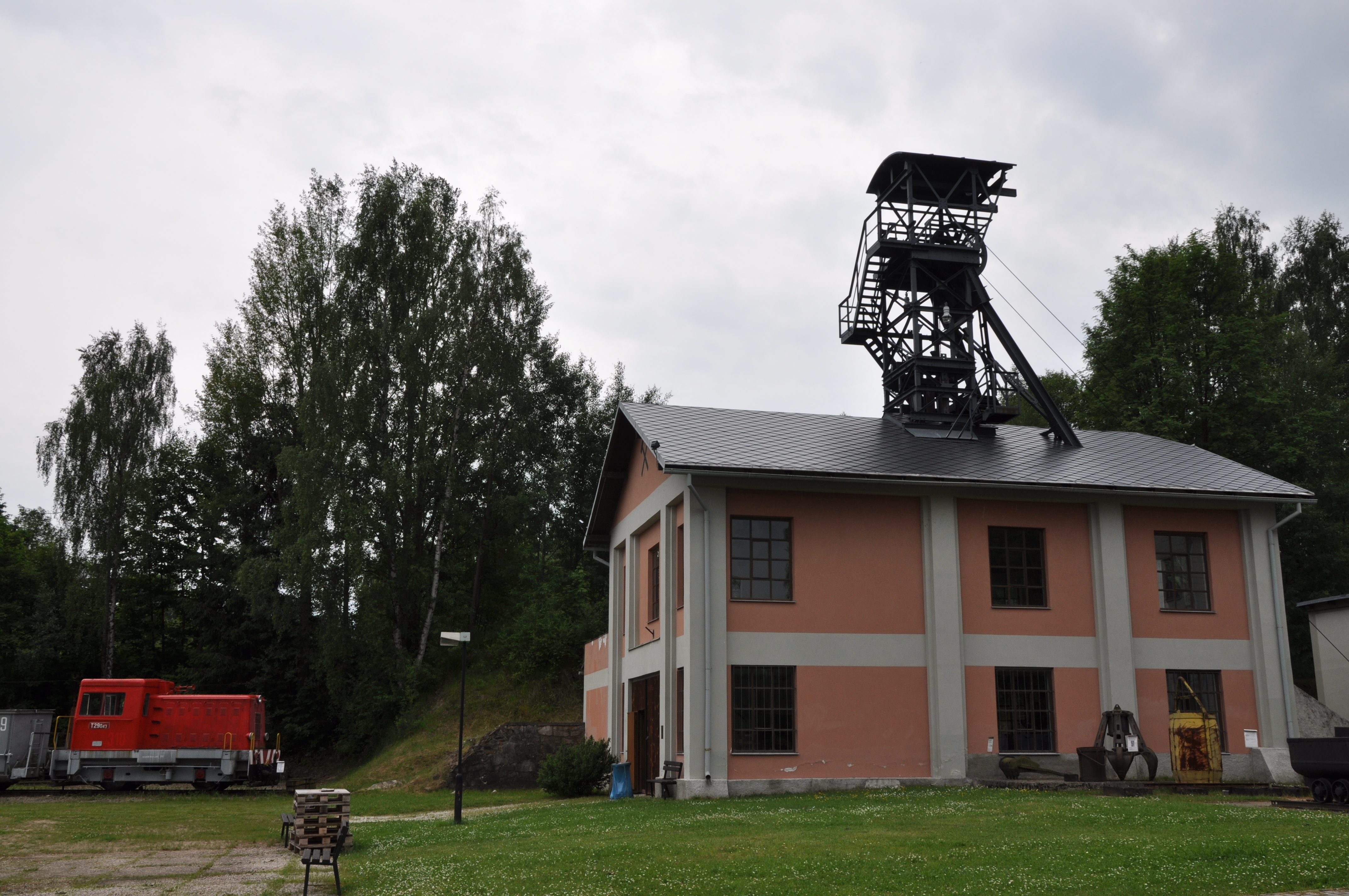 Bývalý cínový důl Vilém v Krásně